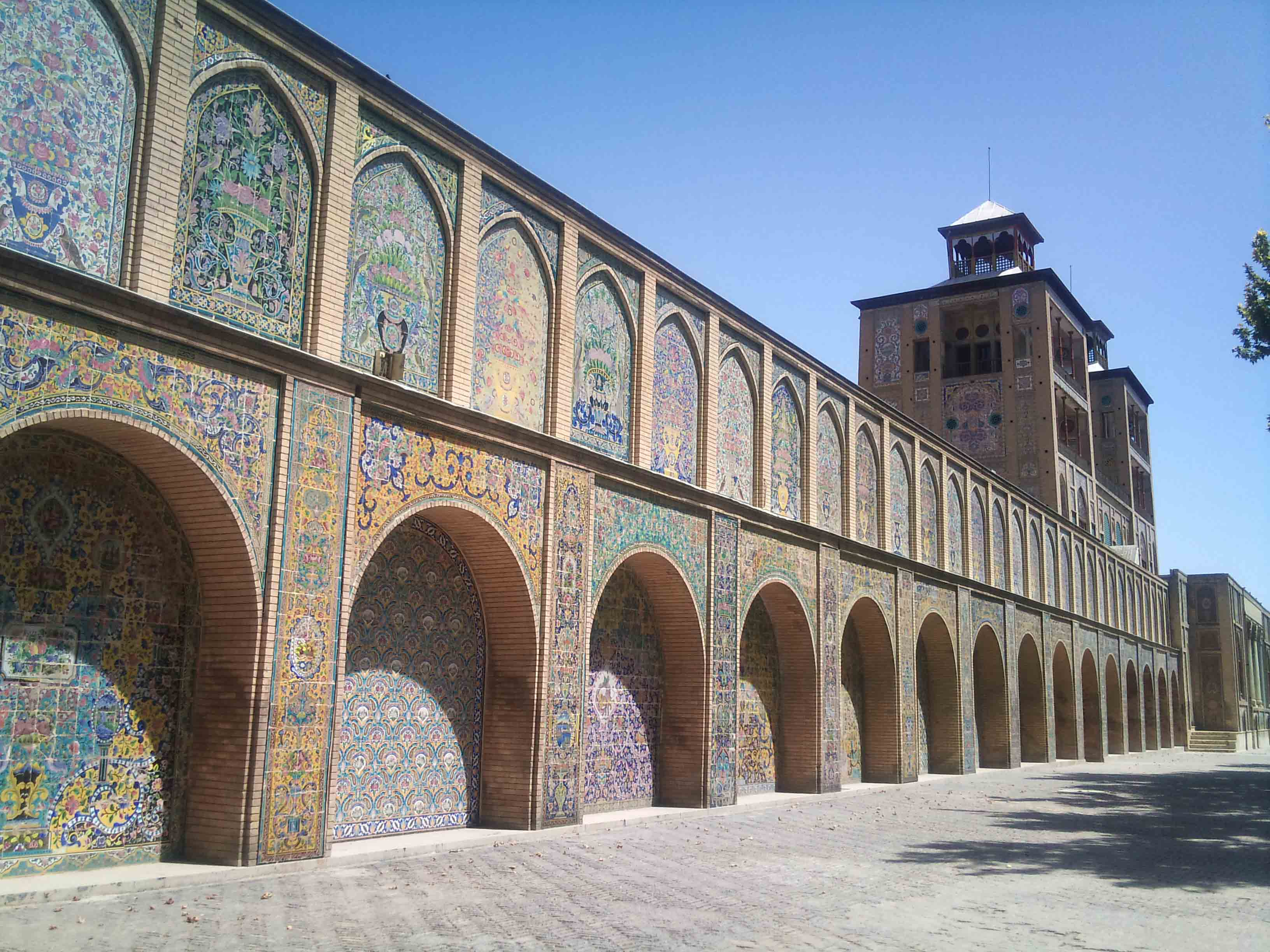 نمایی از کاخ گلستان